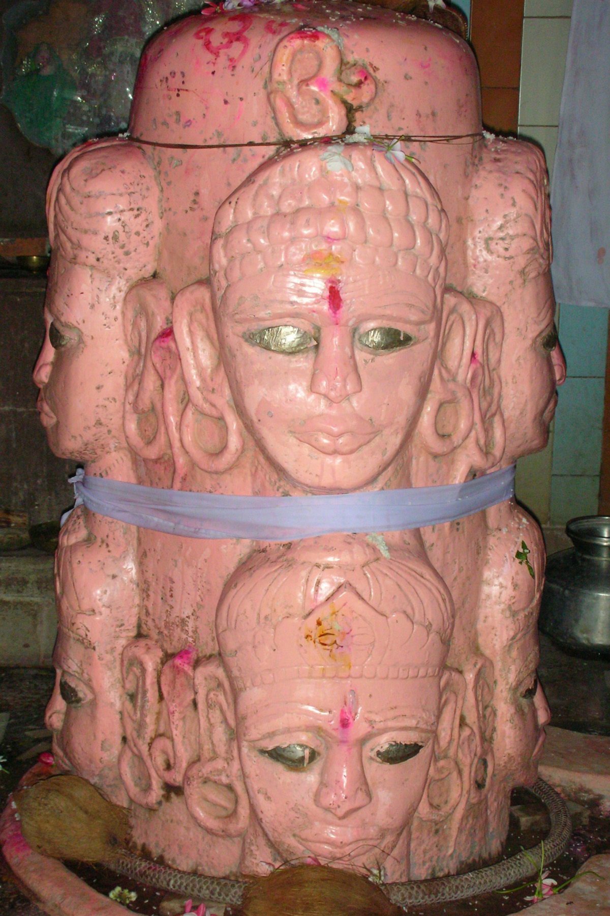 Ashtamukhi Shiv, Kharod, Chhatisgarh, India